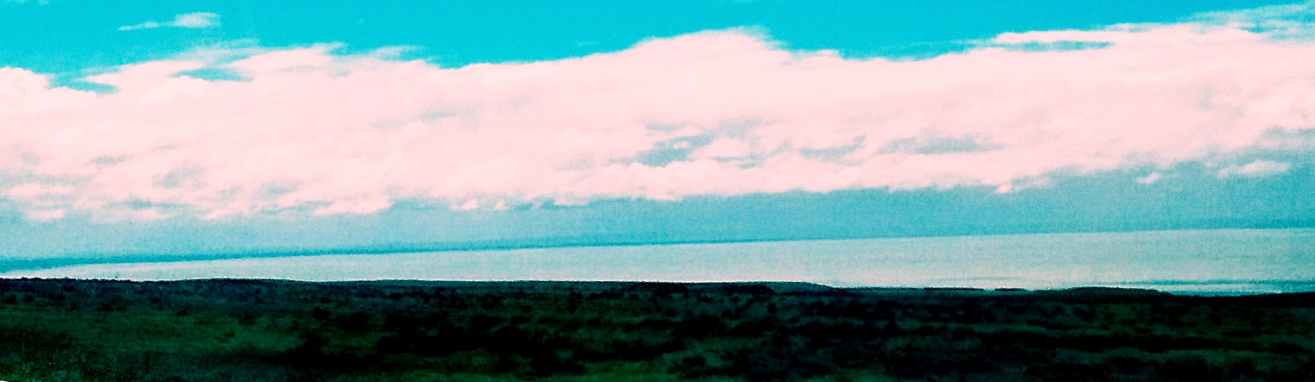 La EXTENSA PLAYA DE LA BAHÍA